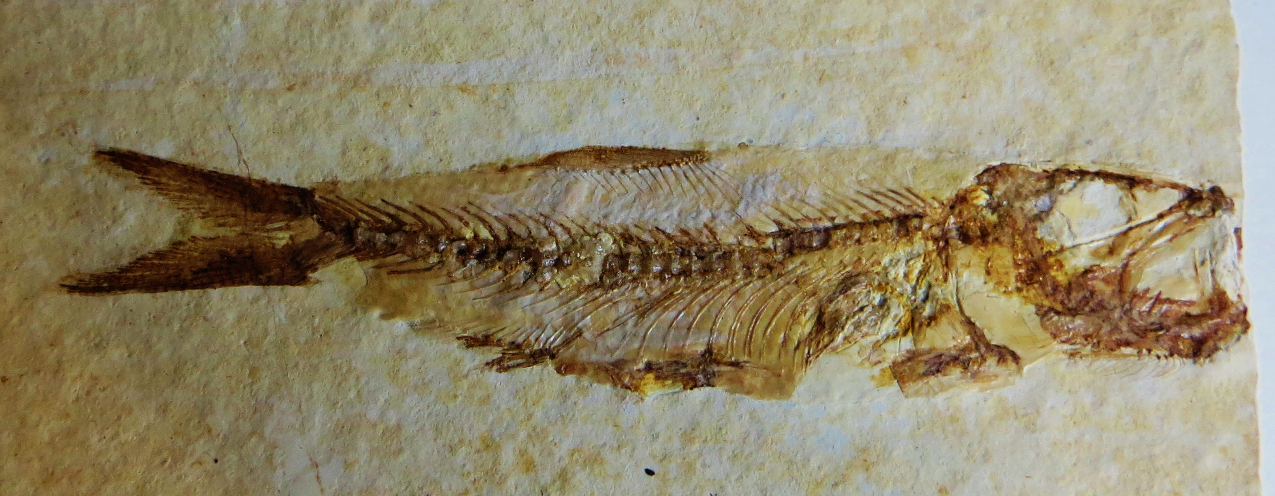 Fossil of Ascalabos, an extinct fish - Took the picture at Teylers Museum, Haarlem